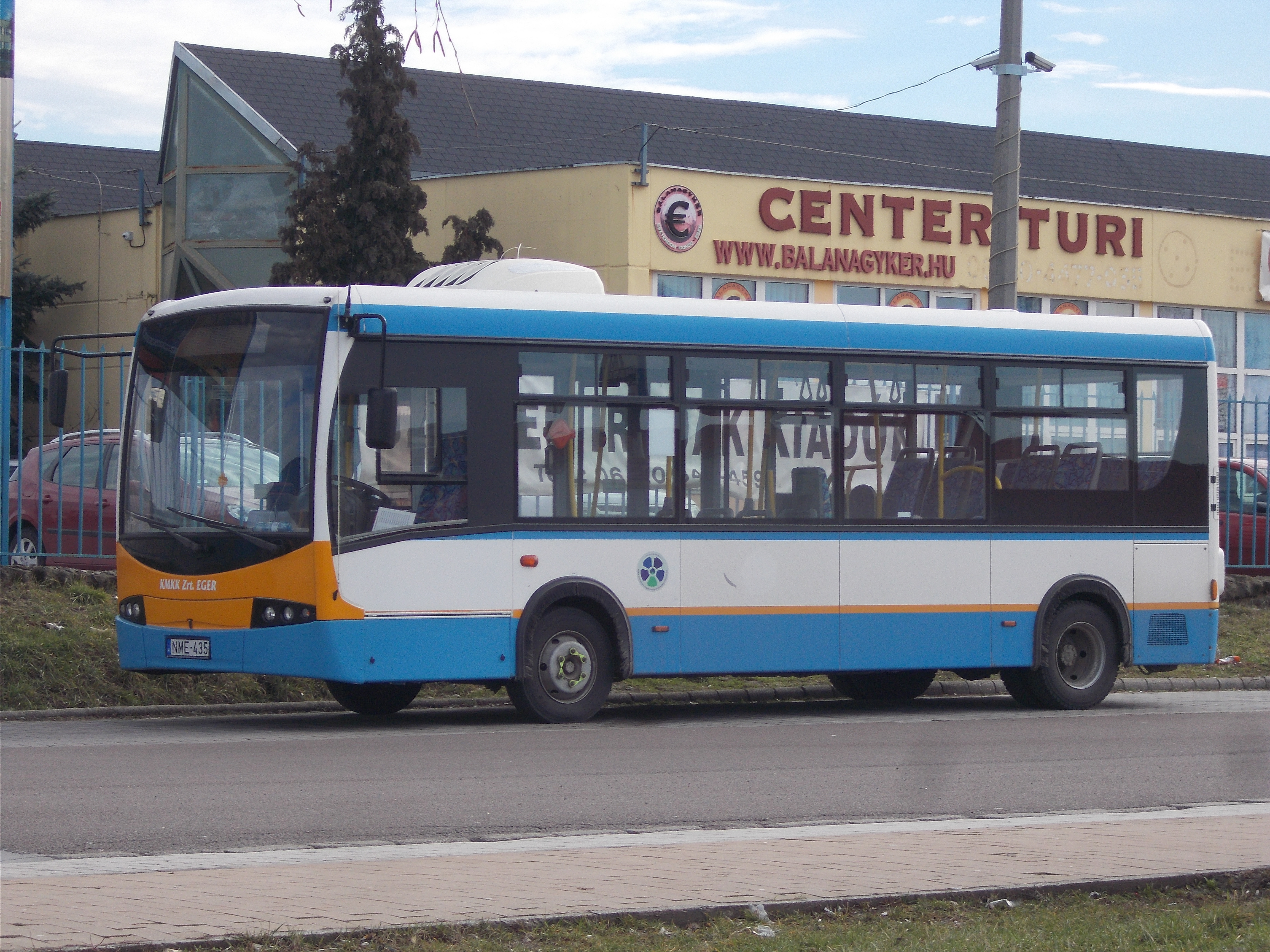 Enterprise Plasma busz Egerben